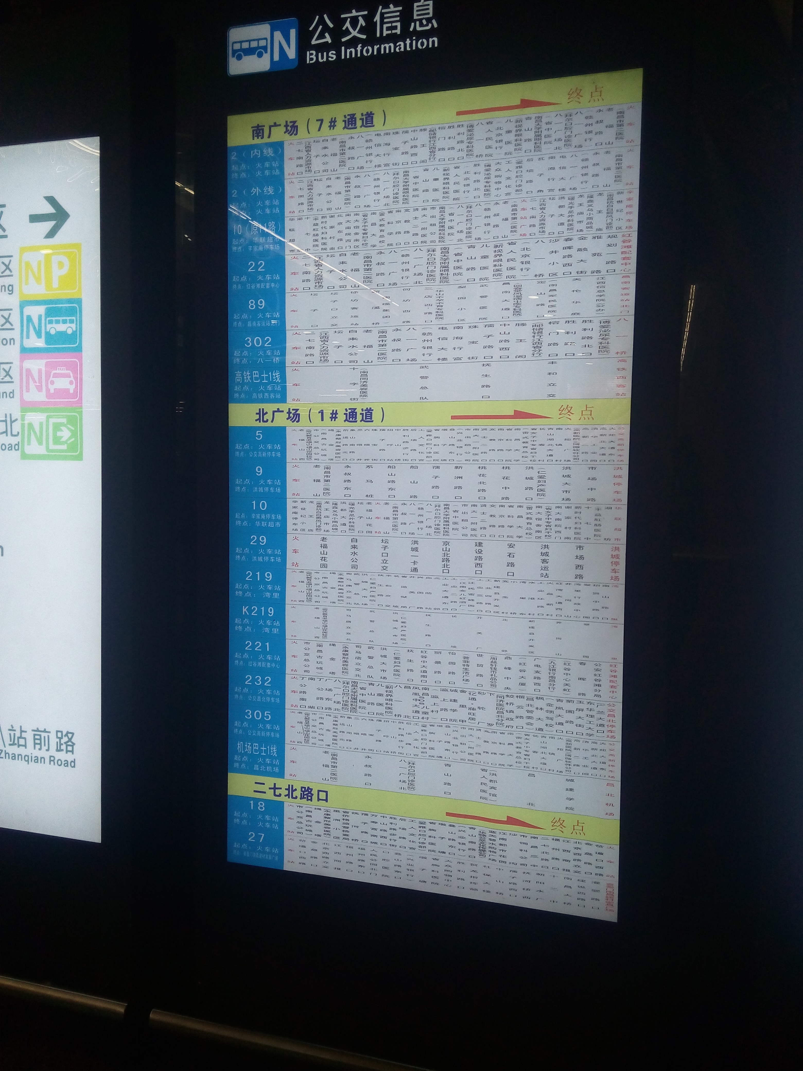 西广场地下空间信息